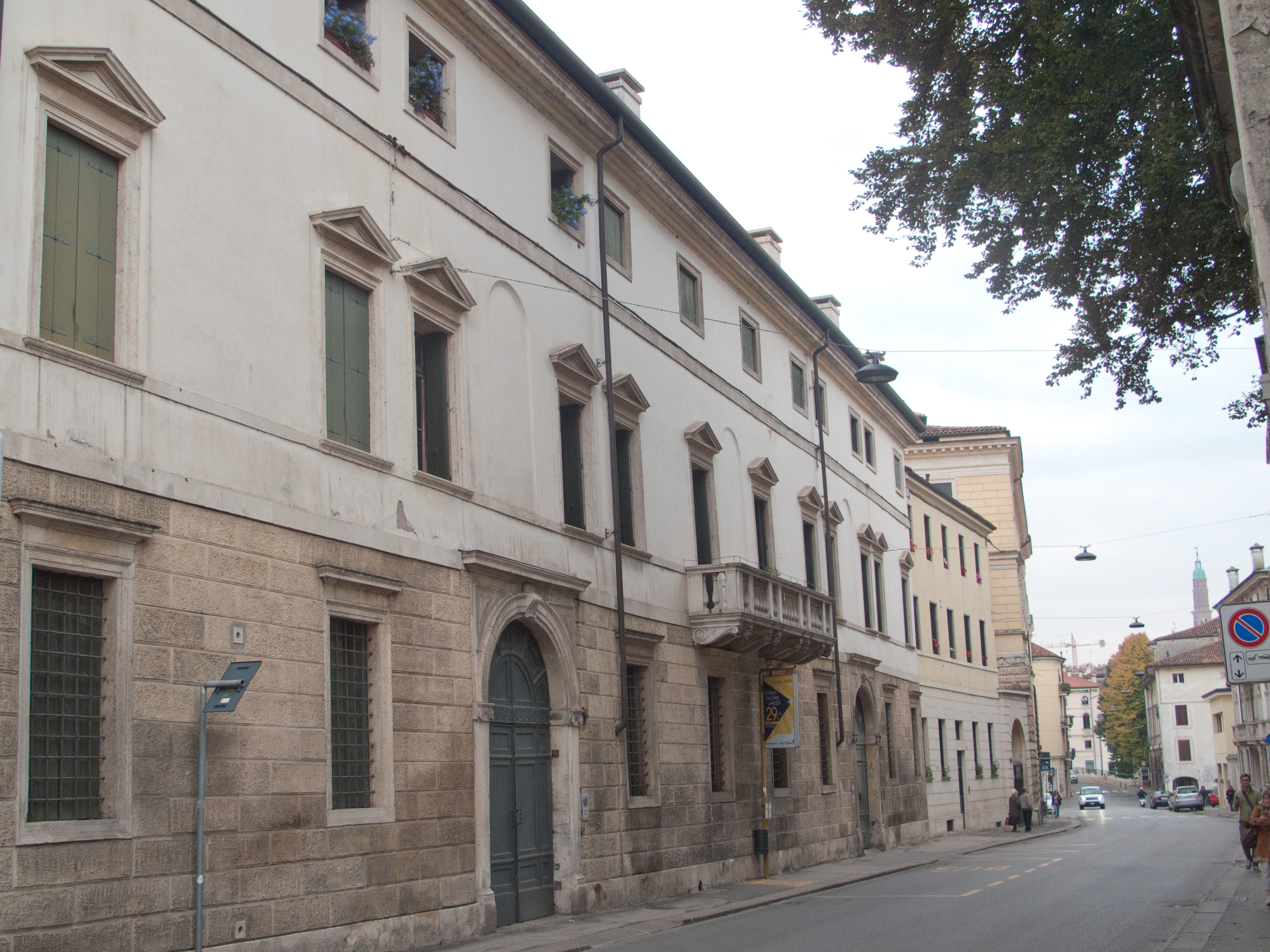 Vicenza - Borgo Pusterla - Palazzo Capra Querini, facciata